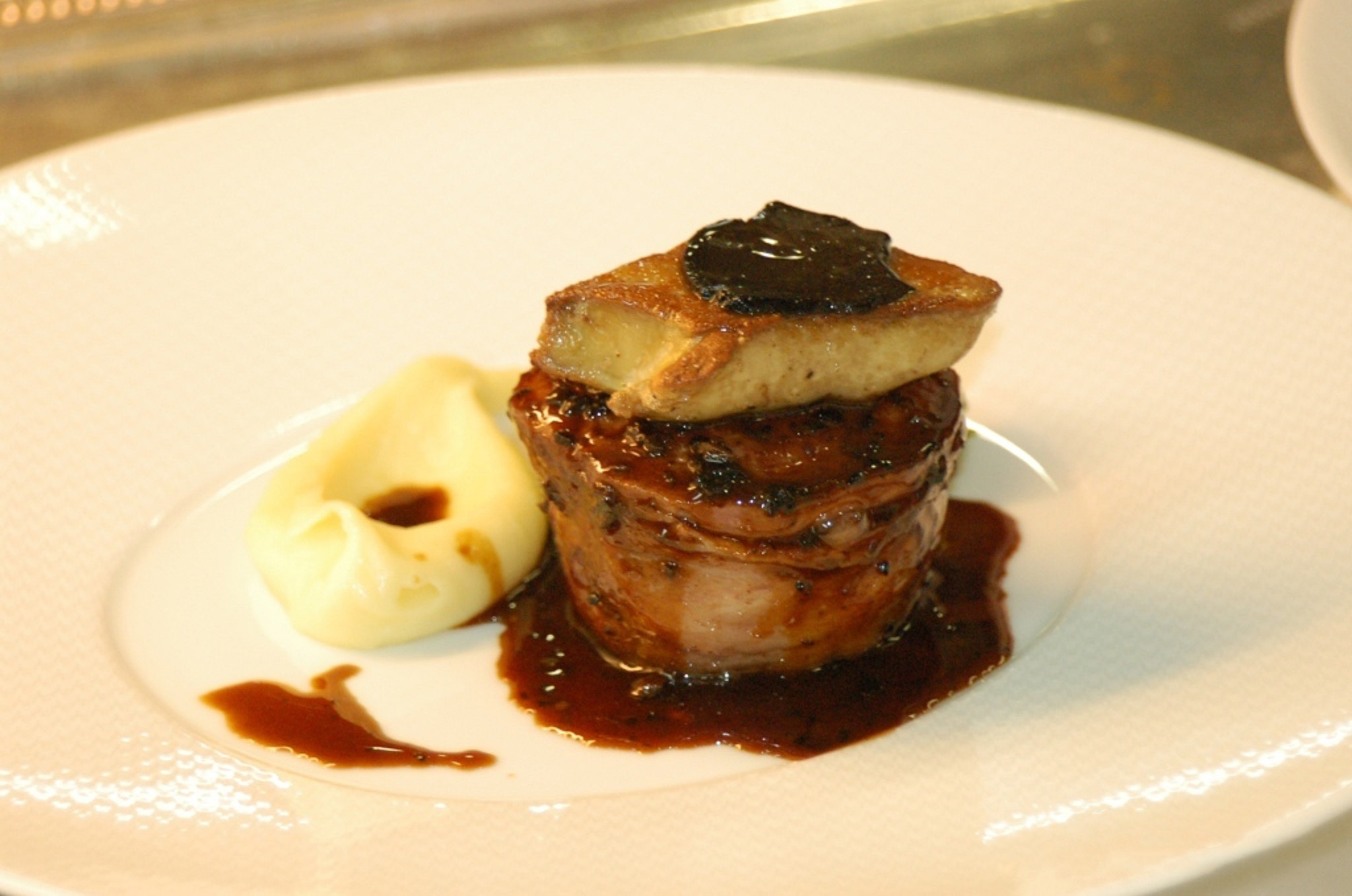 Foie gras, rognon, truffe noire d'Uzès et écrasé de pommes de terre